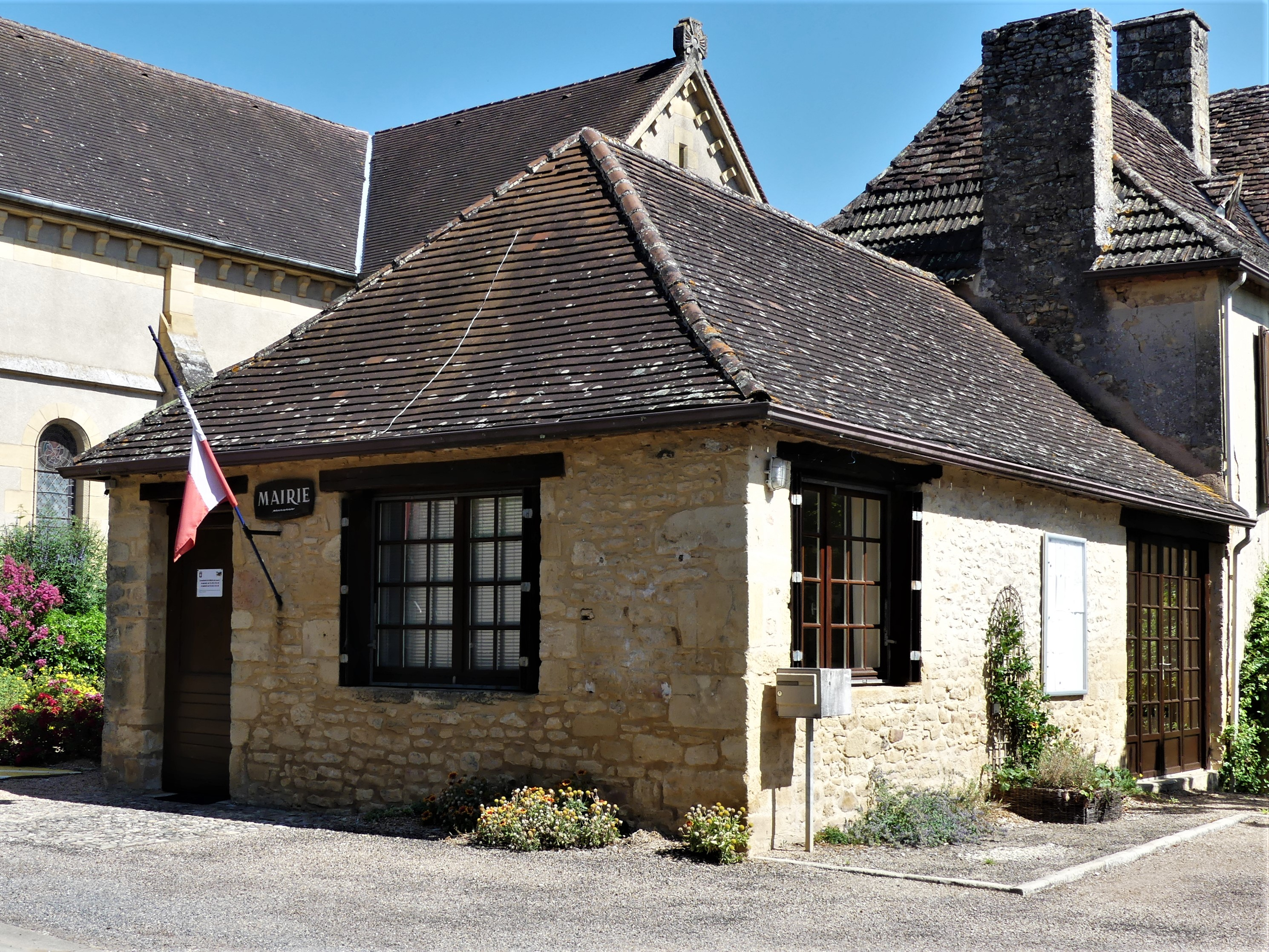 La mairie annexe de Paleyrac, Le Buisson-de-Cadouin, Dordogne, France.